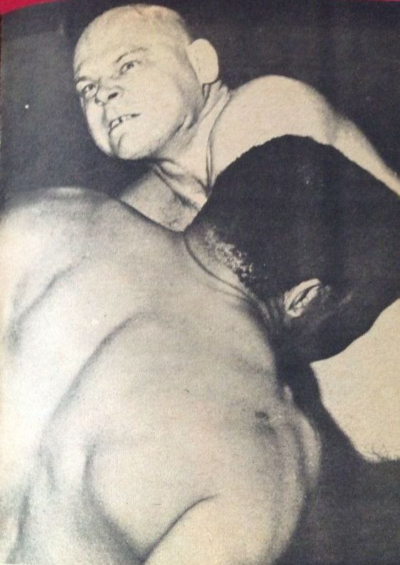 Jack Brisco dans l'almanach de catch Official Wrestling Yearbook n.3 de juin 1973.